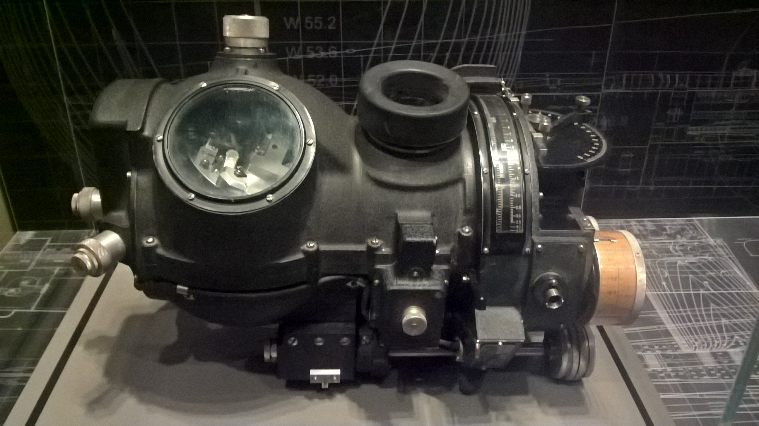 Amerykański celownik bombowy Nordena eksponowany w Muzeum II Wojny Światowej w Gdańsku.